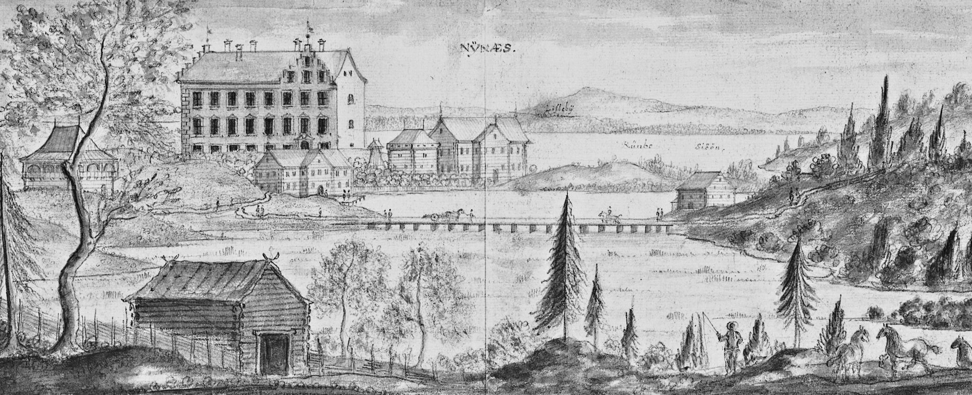 Erik Dahlbergh skiss över Nynäs, förlaga för Sueciaverket